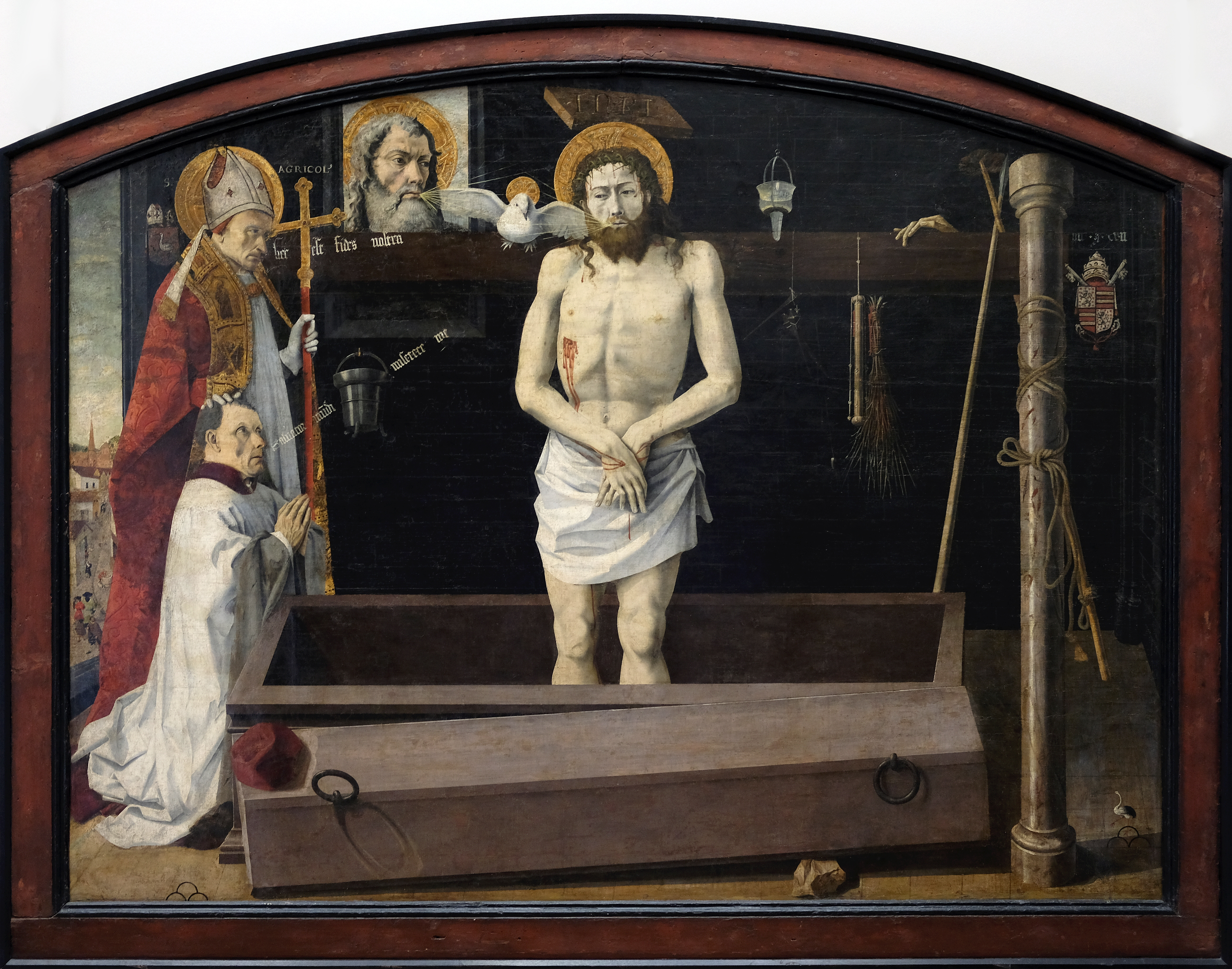 Le donateur, sans doute un chanoine de l'église Saint-Marcellin de Boulbon (Bouches-du-Rhône), est présenté par saint Agricol à la Trinité (Dieu le Père, la Colombe, le Christ au tombeau entouré des instruments de la Passion). On a également ajouté, à côté de l'évêque les armes du chapitre Saint-Agricol (cigogne d'argent tenant dans son bec un serpent), le nom de saint Agricol et les armes du pape Jean XXII.